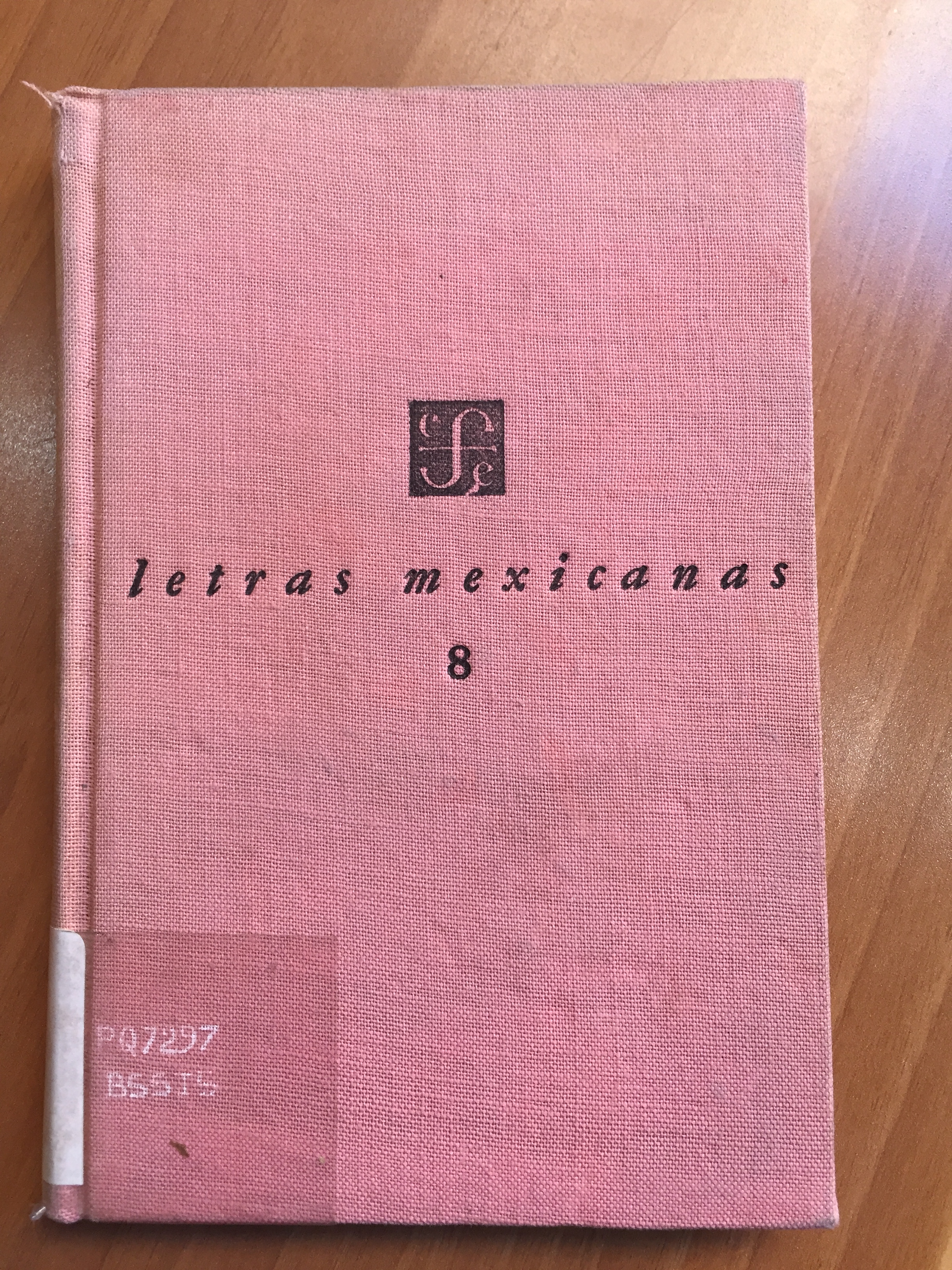 Primera edición de Imagenes.